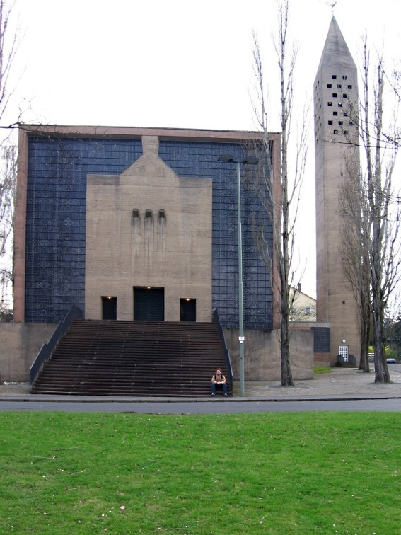 Pfarrkirche St. Maria (Fatima Friedenskirche) in Kassel-Wilhelmshöhe. Architekt: Gottfried Böhm